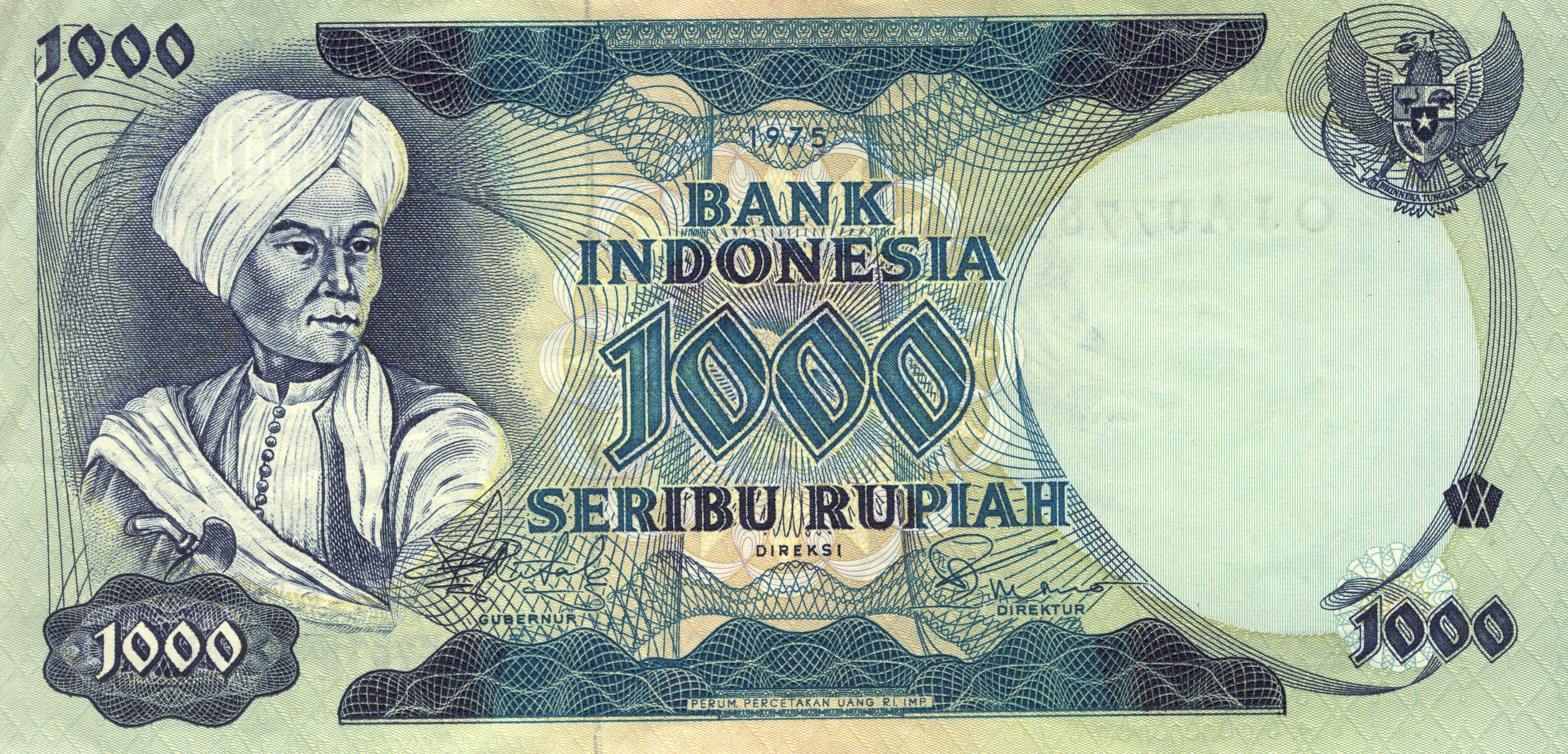 Scannerisation billet personnel